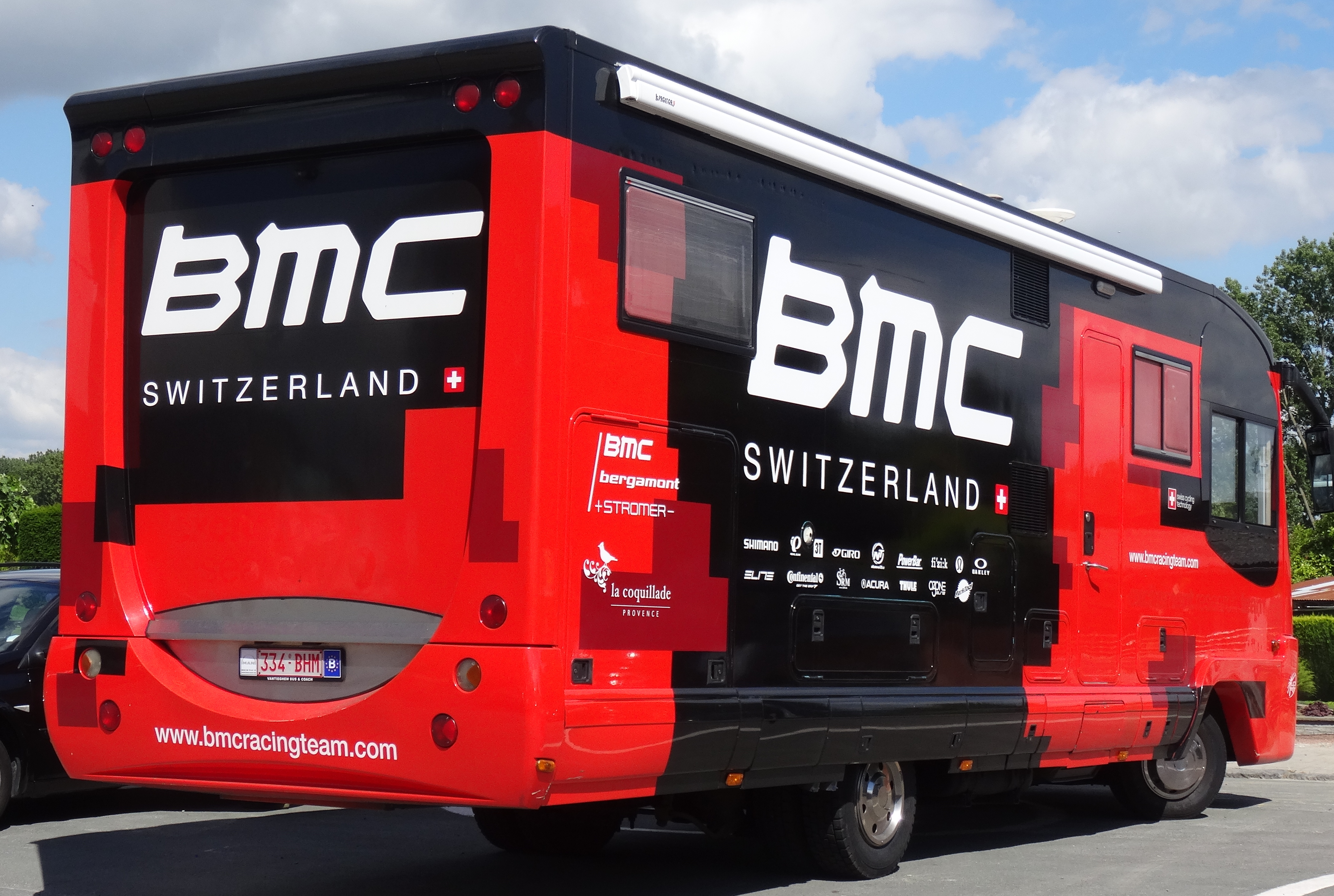 Reportage photographique réalisé le mercredi 25 juin à l'occasion du départ et de l'arrivée de l'Internationale Wielertrofee Jong Maar Moedig 2014 à Oetingen (Gooik), Belgique.